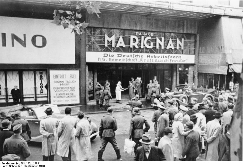 Paris, Besuch Robert Ley Reichsorganisationsleiter Dr. Ley besuchte in Paris die Diensstelle der NS-Gemeinschaft KdF. PK-Scherl Bilderdienst, 8272-40 "Fr." OKW Sept. 1940 [Paris.- Besuch Robert Ley, vor "Passage Marignan"] Abgebildete Personen: Ley, Robert: Reichsorganisationsleiter, Deutsche Arbeitsfront (DAF), Generalrat der Wirtschaft, Deutschland